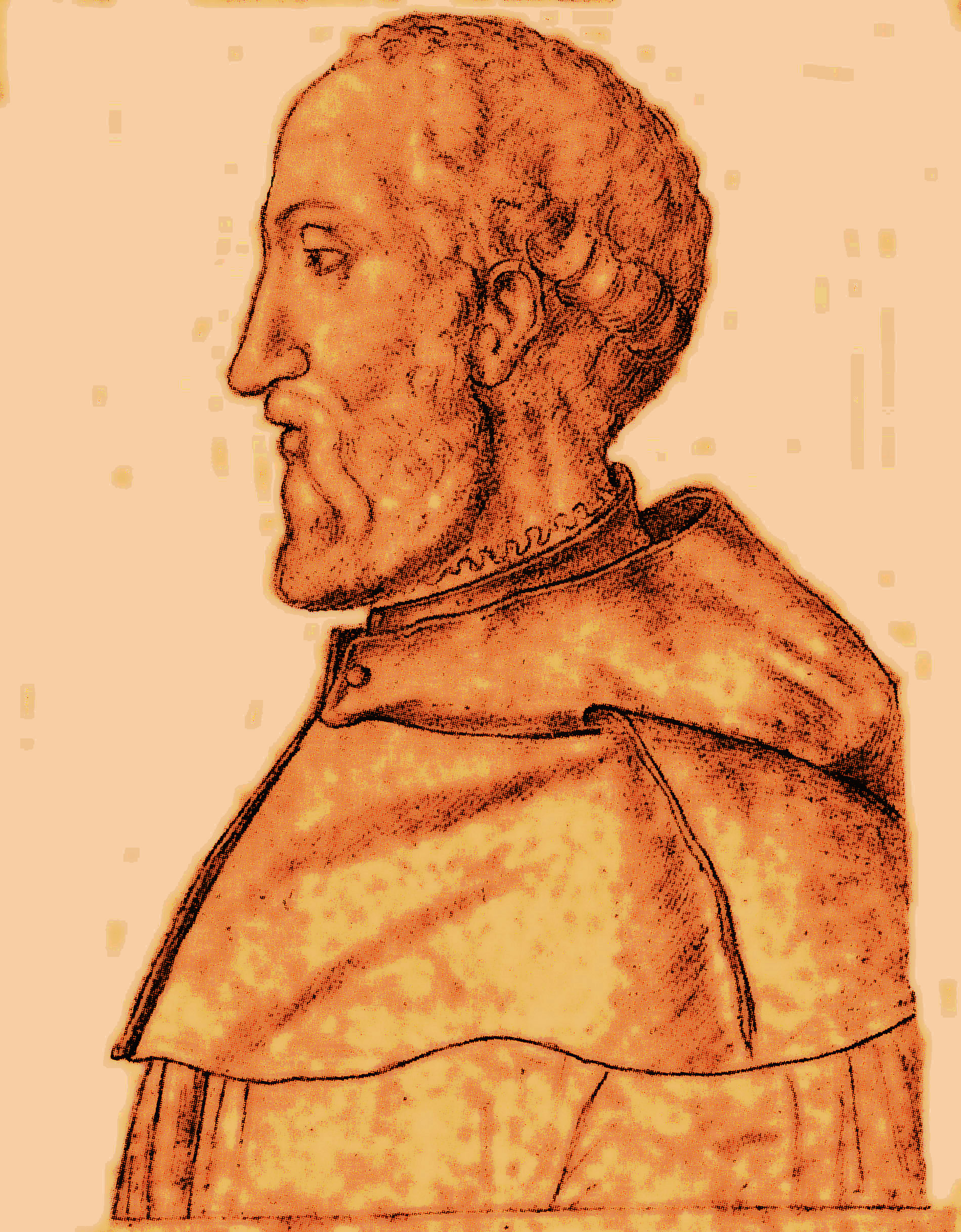 Cardinal Alexandre Farnèse, archevêque d'Avignon au XVIe siècle